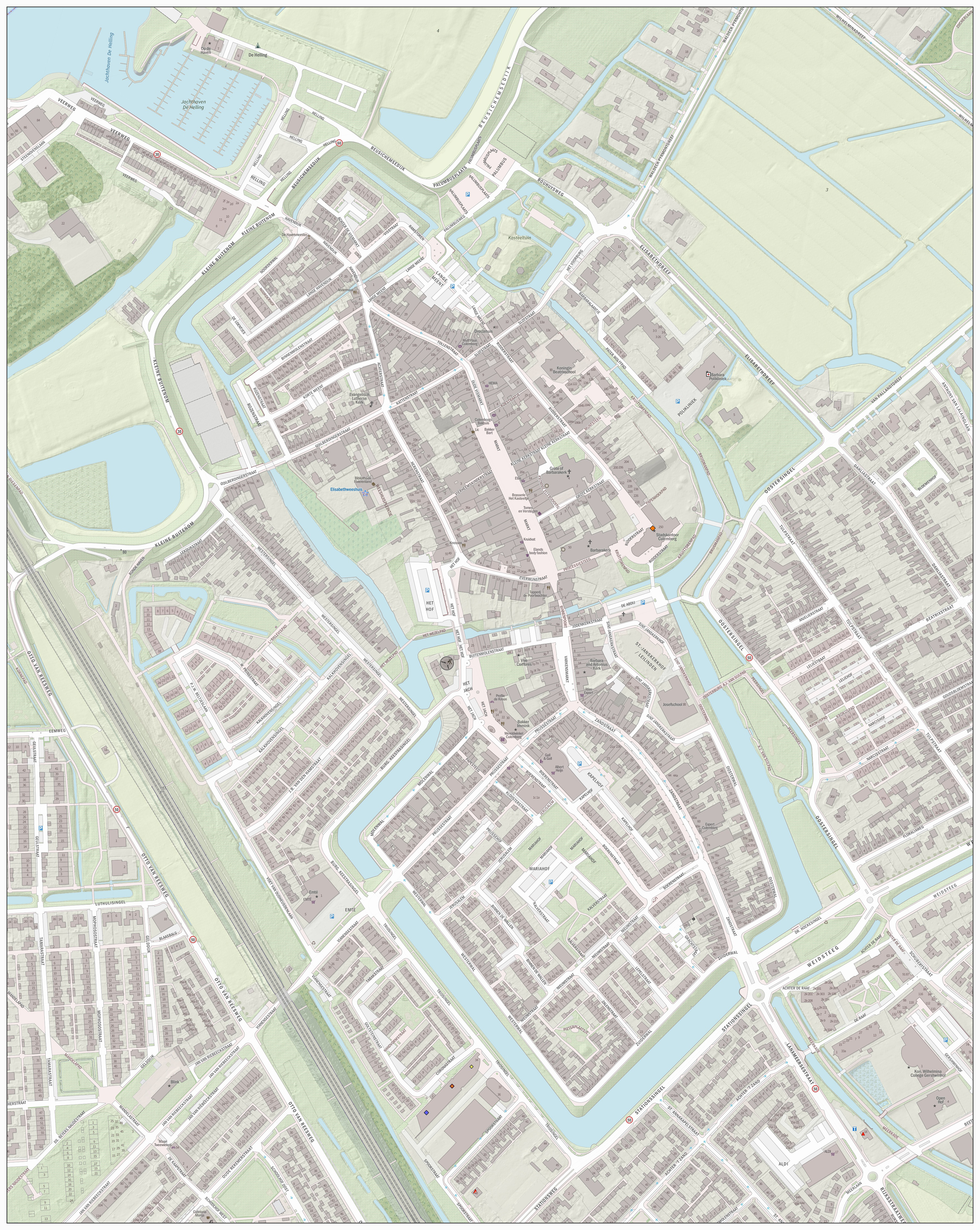 Topografische kaart van Culemborg (centrum van woonplaats). Resolutie: 2688 pixels/km. Kaartbeeld samengesteld uit de open geodata van de Basisregistratie Grootschalige Topografie (BGT), Creative Commons-BY Kadaster, en Top10NL en Top25namen (Basisregistratie Topografie, Kadaster), Creative Commons-BY Kadaster. Gebouwvlakken uit open geodata BAG extract, Creative Commons-BY Kadaster. Wegen uit de OpenStreetMap, CC-BY OpenStreetMap bijdragers. Reliëfschaduw uit de Actuele Hoogtekaart AHN2/AHN3. Samenstelling en kleurenschema: Jan-Willem van Aalst, met QGIS2. Zie ook de Legenda.